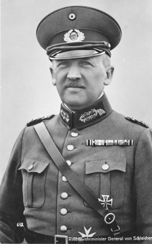 Kurt von Schleicher Reichsminister General Kurt von Schleicher (erschossen 1934 bei Röhm-Revolte) in Uniform, Porträt Abgebildete Personen: Schleicher, Kurt von: Reichskanzler, Reichswehrminister, General, 1934 ermordet, Deutschland (GND 118608037)